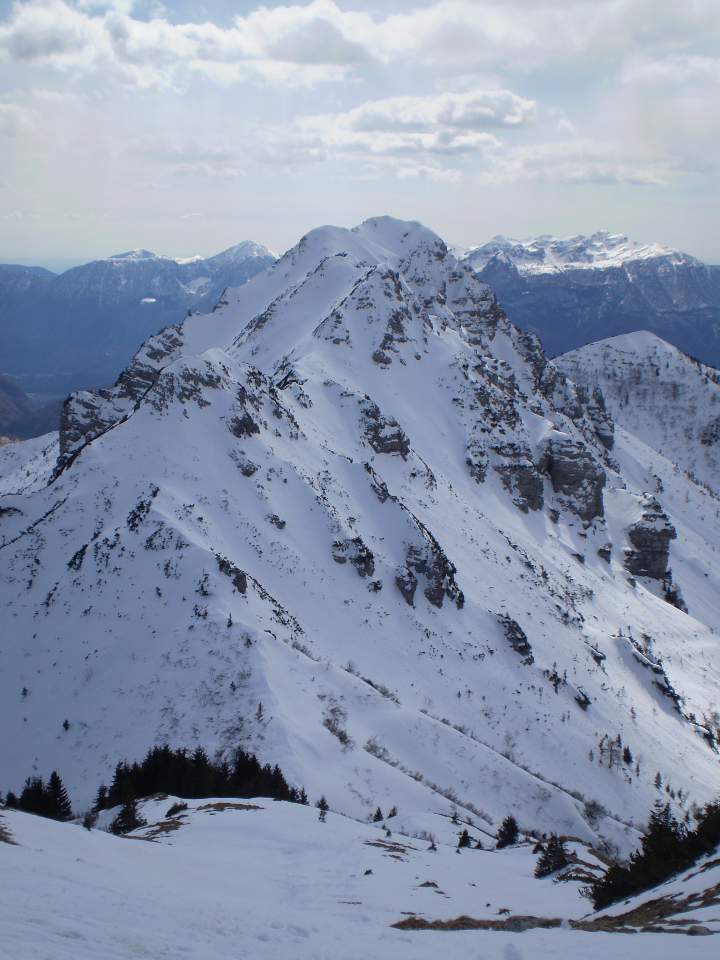 il monte Arvenis (1.968 m) in Carnie (provincia di Udine)